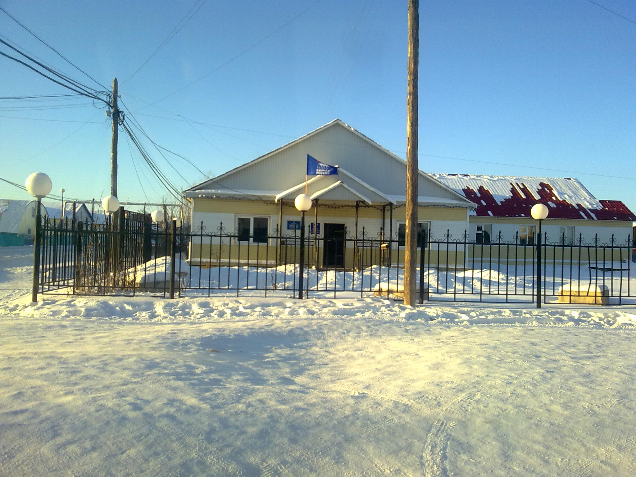 Үөрэхтээһин управлениета